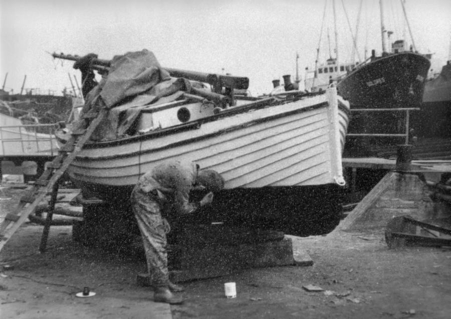 De Piet Hein van de Lischgroep op de werf De Groot en van Vliet te Slikkerveer in 1963